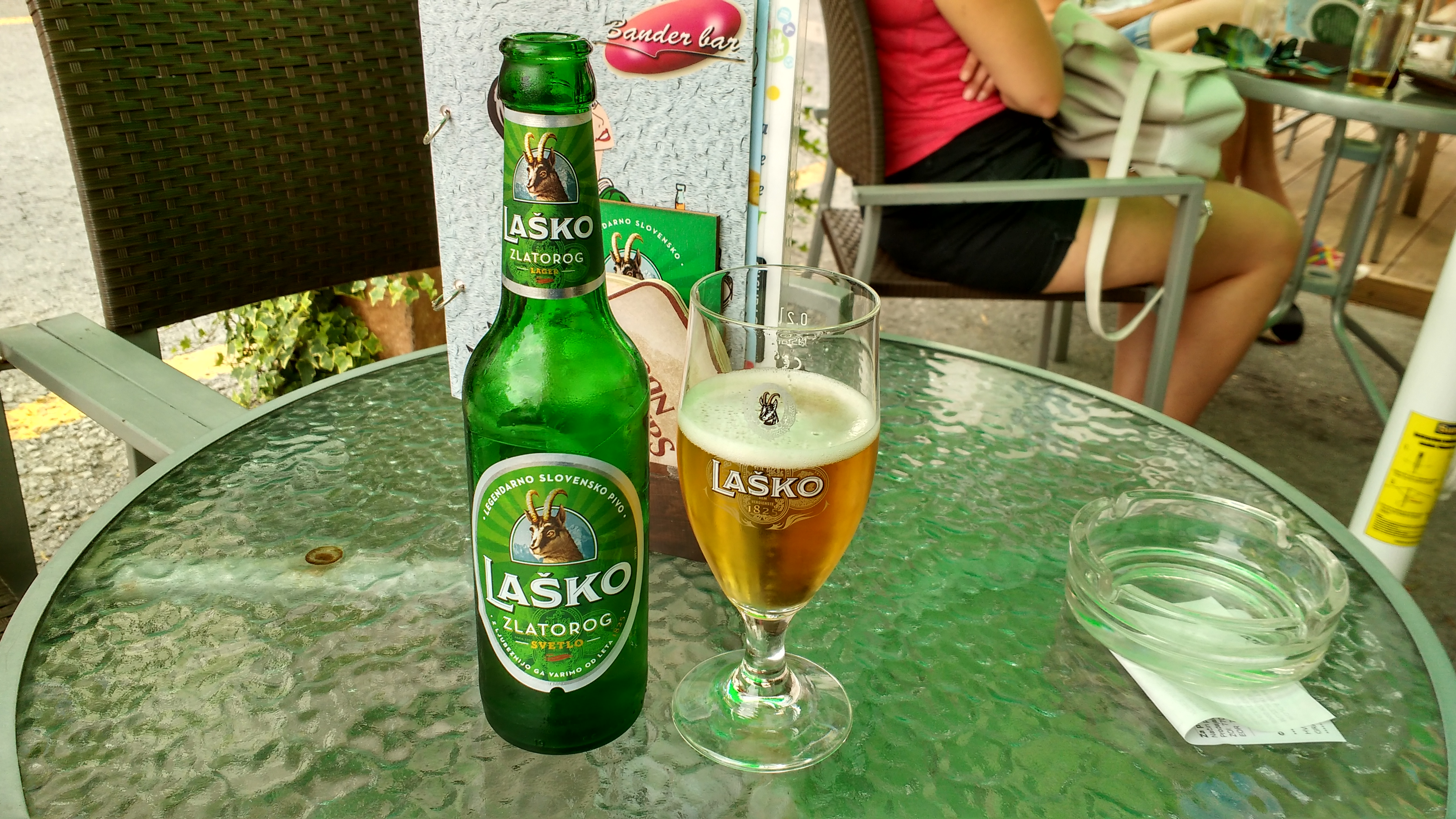 Koper, Eslovênia